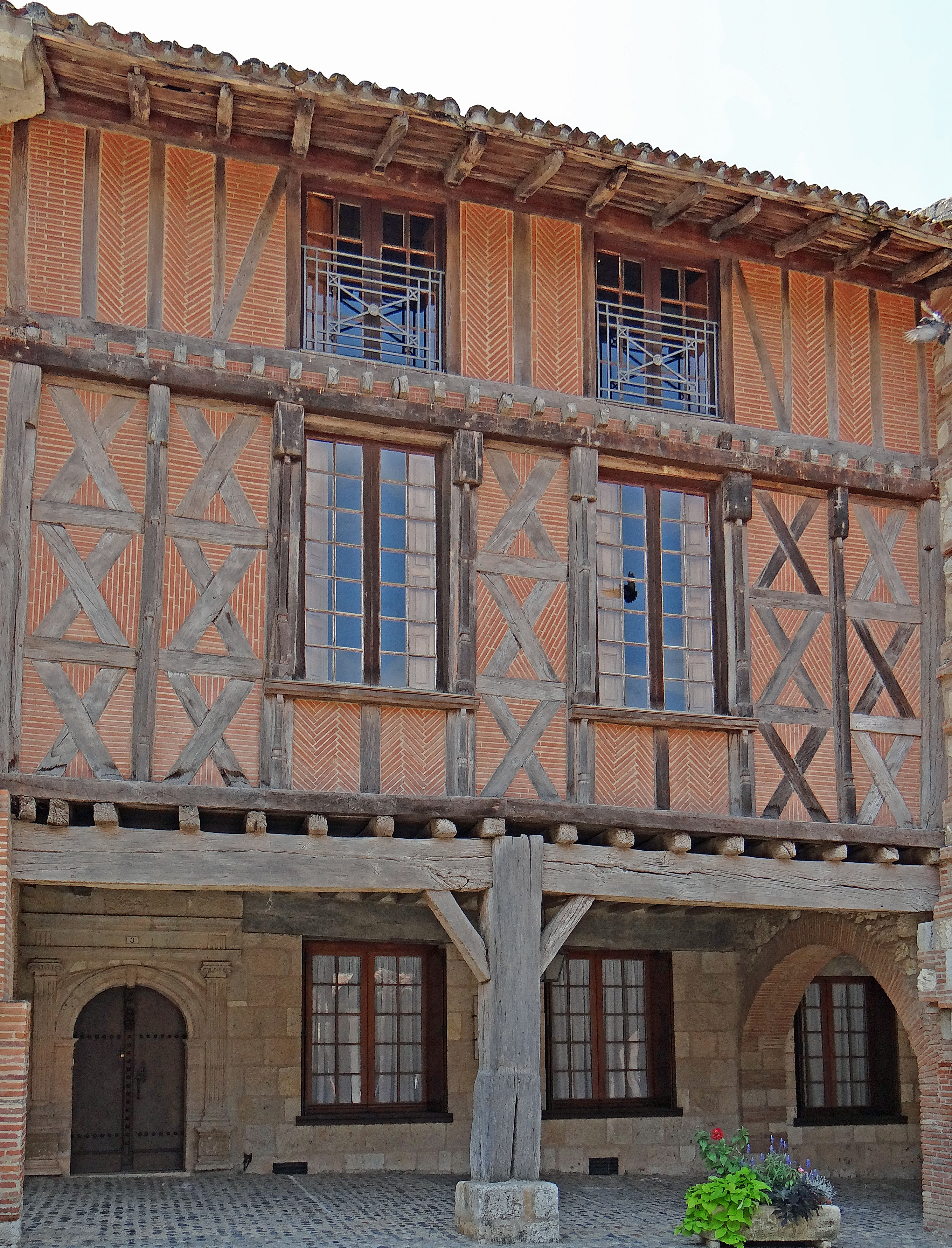 Auvillar - Place de la Halle-aux-Grains - Façade de l'immeuble n°3